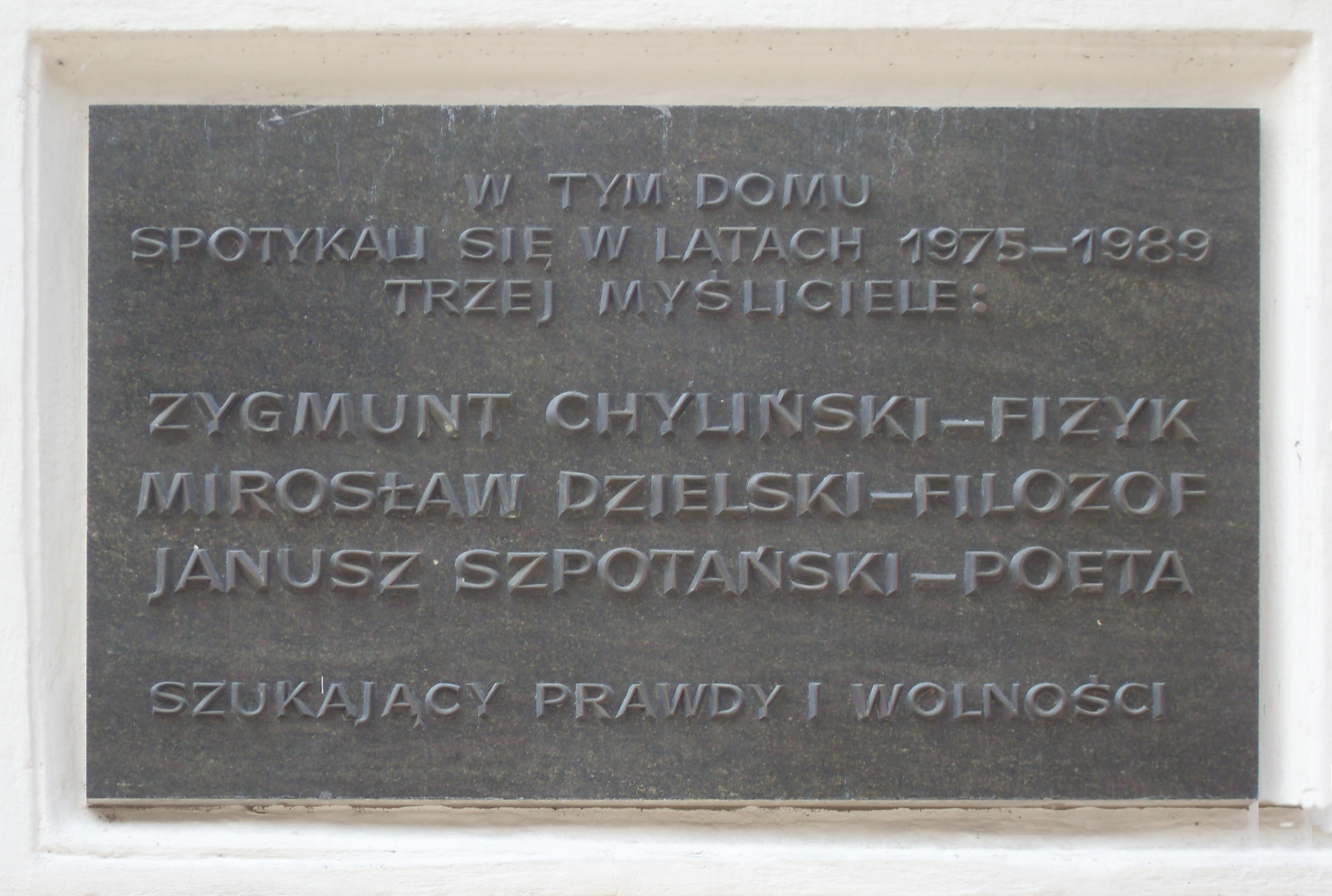 Tablica pamiątkowa na kamienicy, w której mieszkał fizyk Zygmunt Chyliński przy ul. Poselskiej w Krakowie